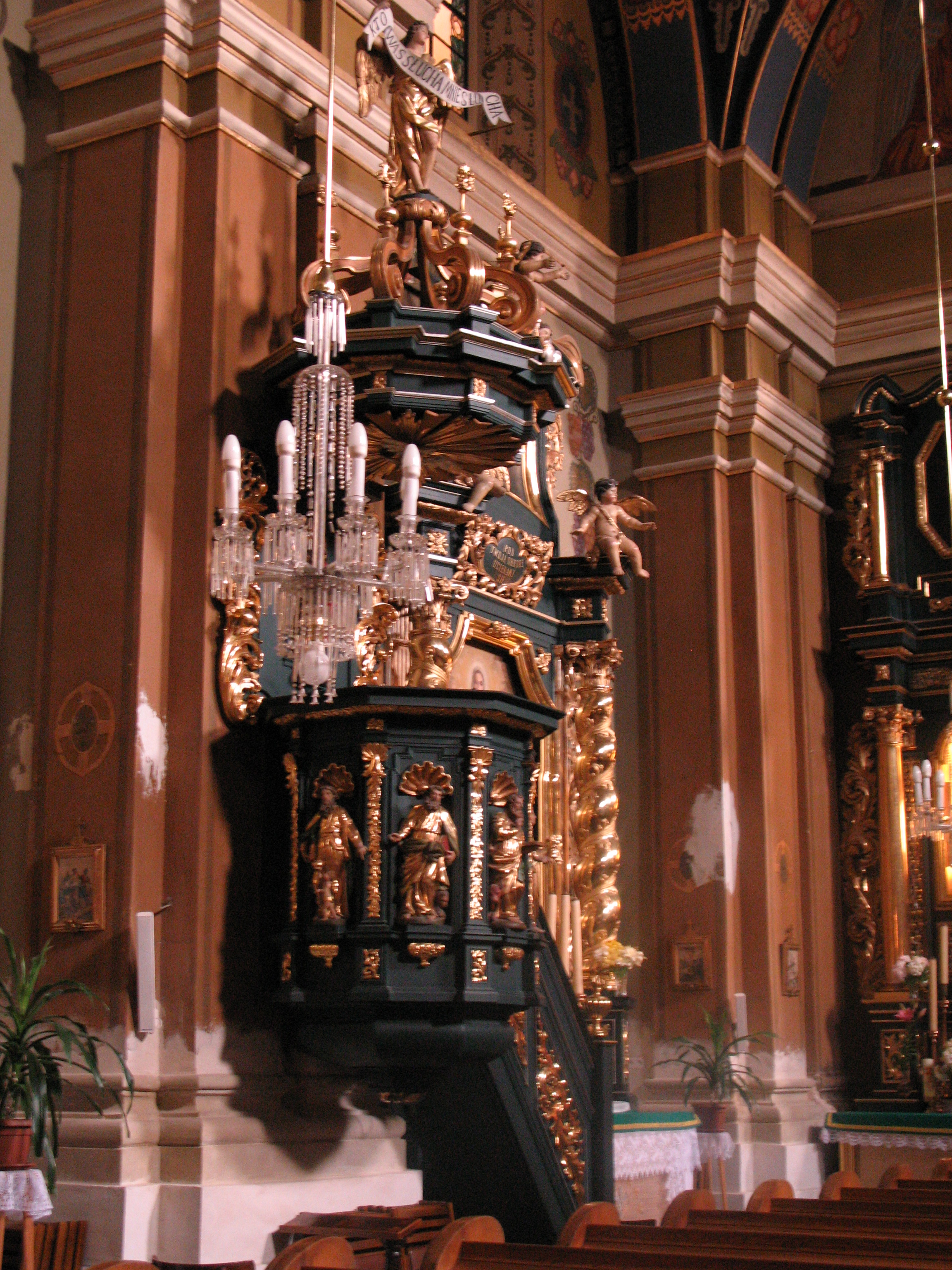 Kraków, Poland